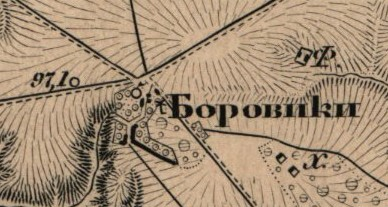 Хутір Боровиків на трьохверстовій мапі Ф.Ф. Шуберта. Середина ХІХ століття.